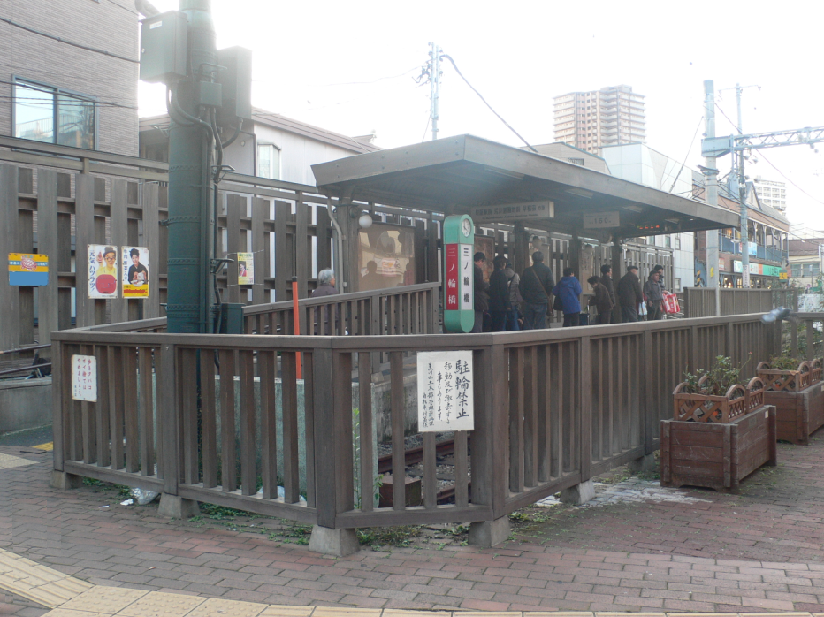 リニューアル後の三ノ輪橋電停